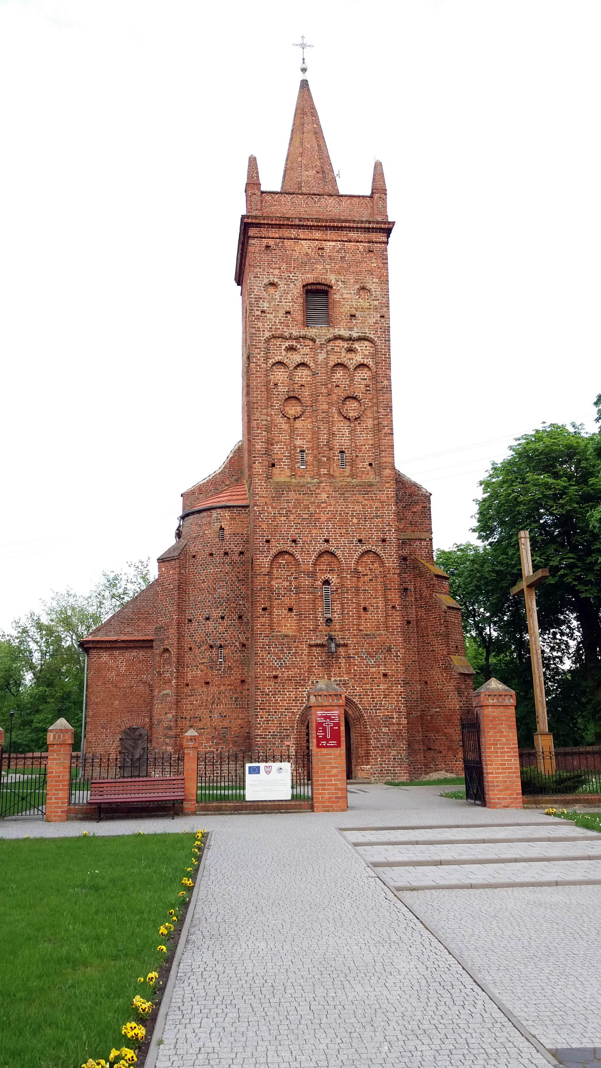 Parafia Rzymsko-Katolicka pw. Najświętszej Maryi Panny Wniebowziętej w Psarskiem